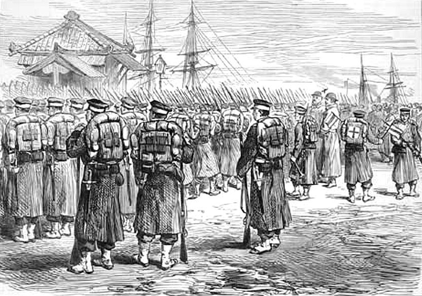 1877 Troops For Satsuma (Embarkment)